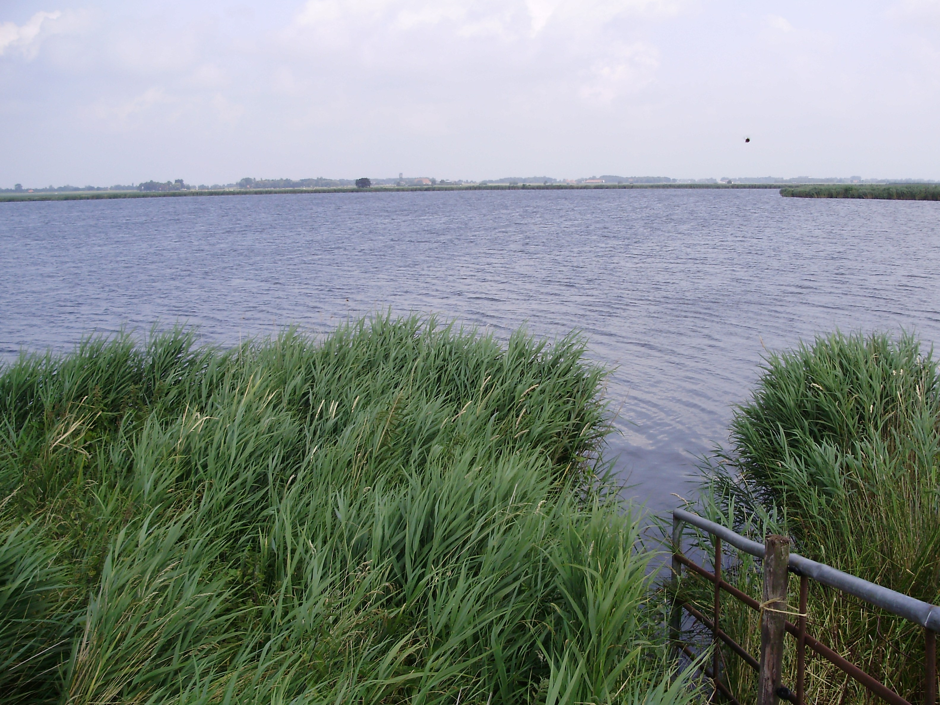 De Sondelerleien in de gemeente Gaasterlân-Sleat in provincie Friesland (Nederland)